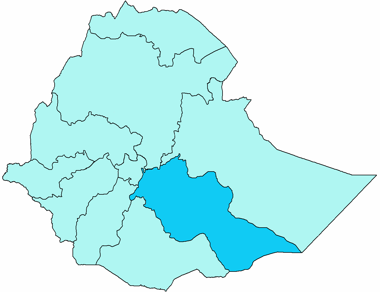 Mappa del vicariato apostolico di Meki. Fonte per i confini della diocesi: Ethiopian Catholic Church.